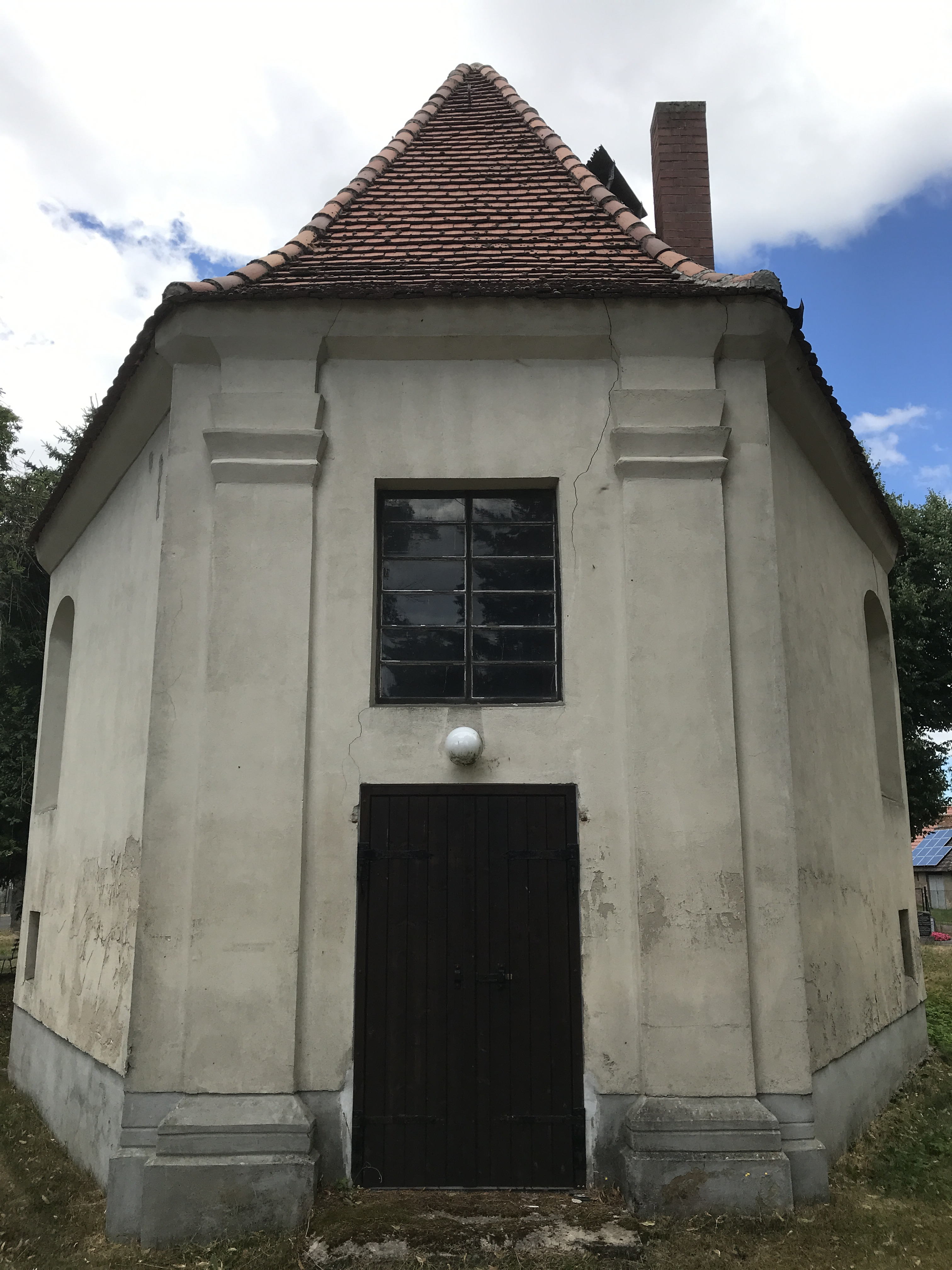 Die Dorfkirche Schenkendorf ist eine Feldsteinkirche aus dem 15. Jahrhundert in Steinreich, einer Gemeinde im Landkreis Dahme-Spreewald im Land Brandenburg.